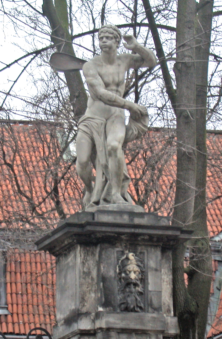 Varsavia, Palazzo dei Quattro Venti (Pałac Pod Czterema Wiatrami) su via Długa, statua di un vento ("Euro").